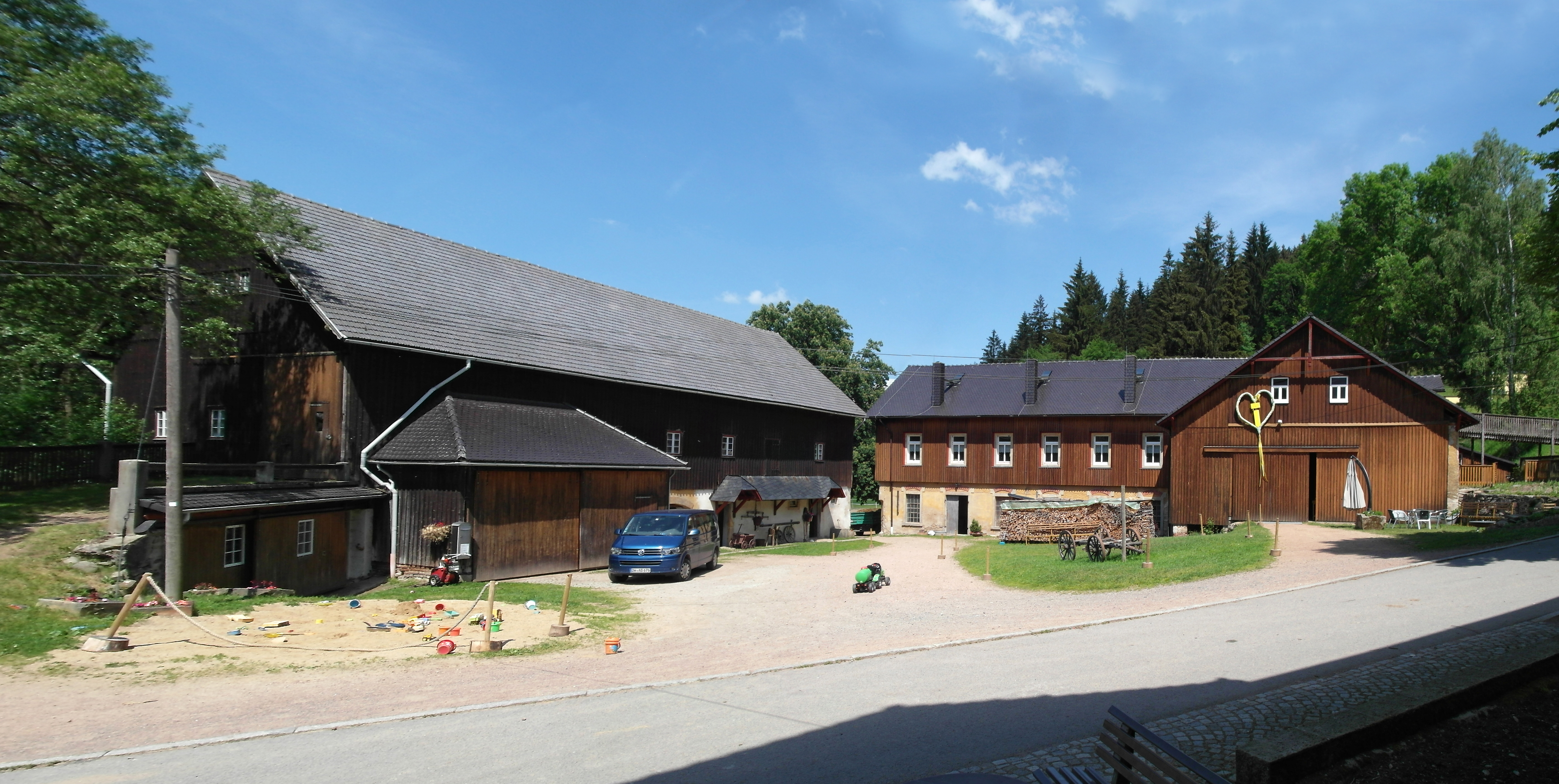 28.05.2018 01744 Ammelsdorf (Dippoldiswalde): Die Körnermühle (GMP: 50.800545,13.610327) an der Wilden Weißeritz. Hauptstraße, Ammelsdorf 58/59. Sicht im hof nach Westen. [SAM6549+6551.JPG]20180528460MDR.JPG(c)Blobelt